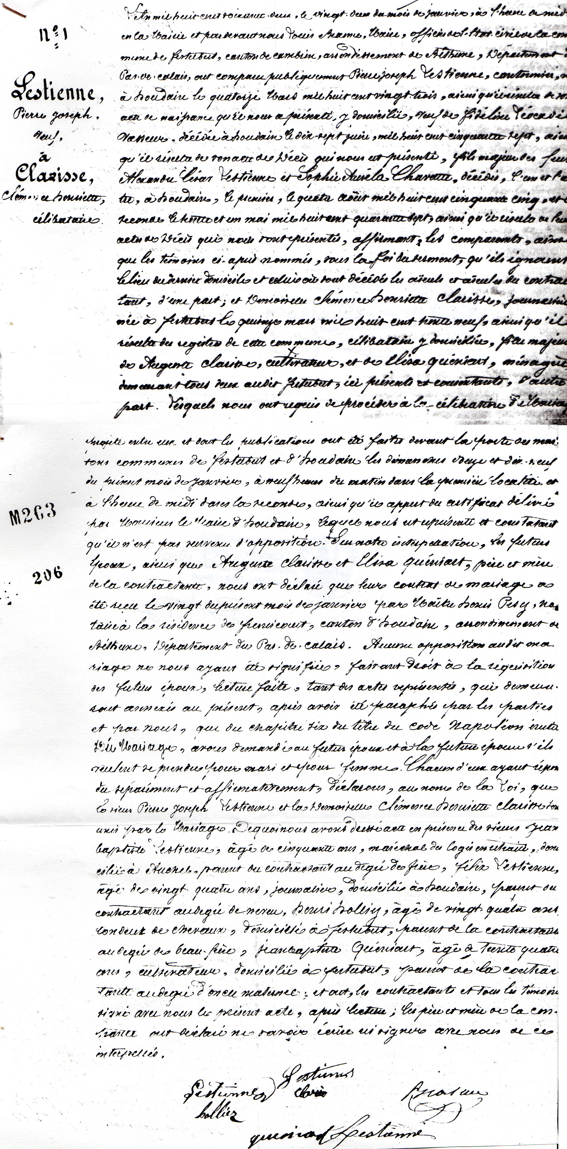 Acte de Mariage de Lestienne Pierre et Clarisse Cléménce